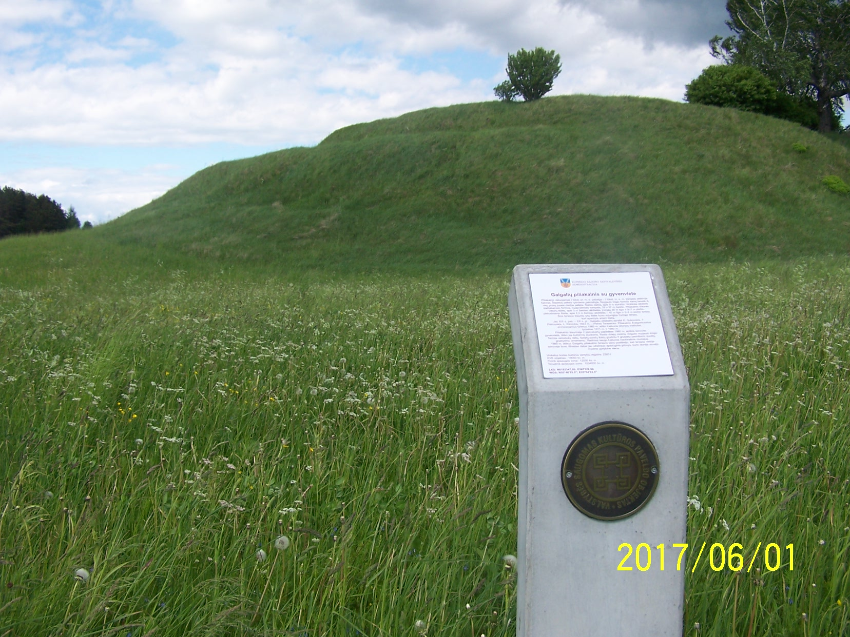 Gaigalių piliakalnis